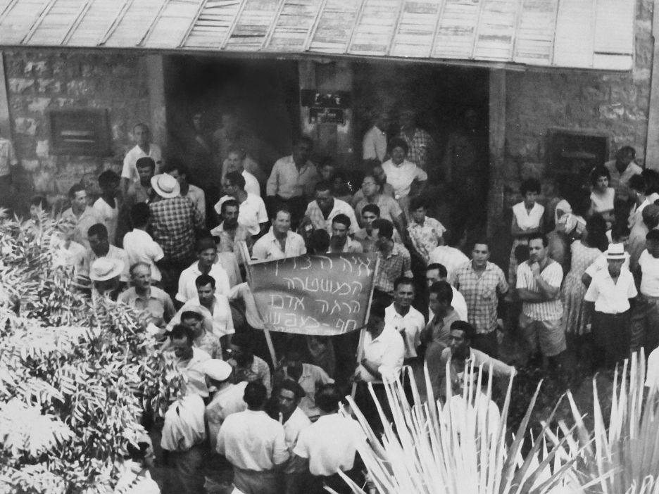 הפגנת תושבי וואדי סאליב לפני תחנת המשטרה בחיפה 9 ביולי 1959 לאחר הירי הסבל יעקב אלקריף